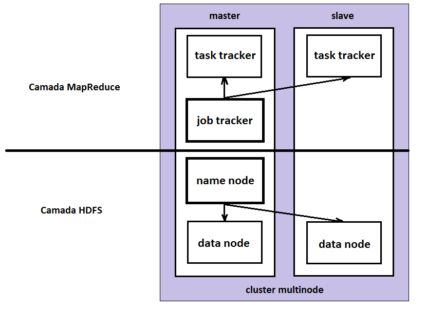 Esquema de cluster Hadoop de multiplos nós